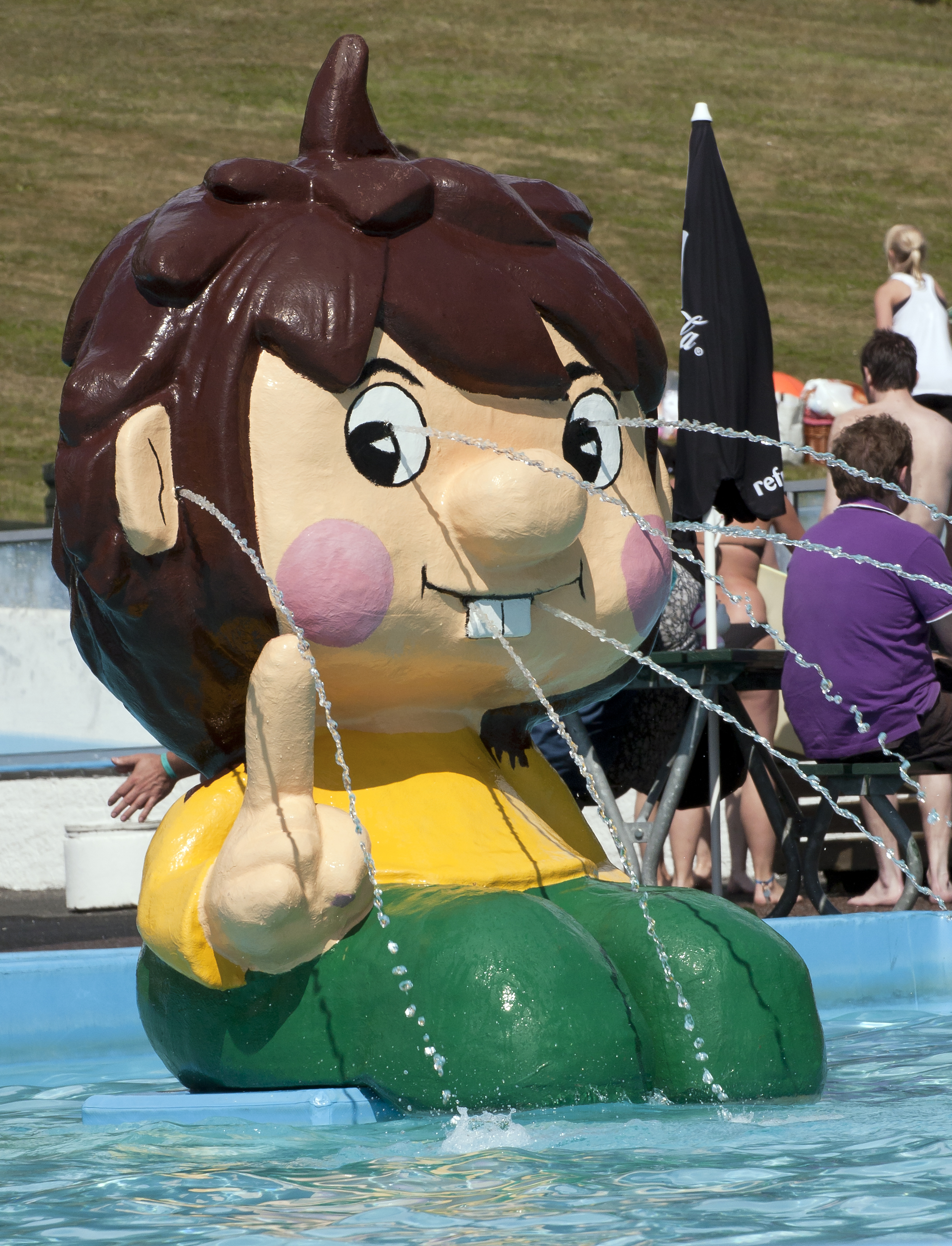 Bassängskulptur på Tosselilla sommarland.